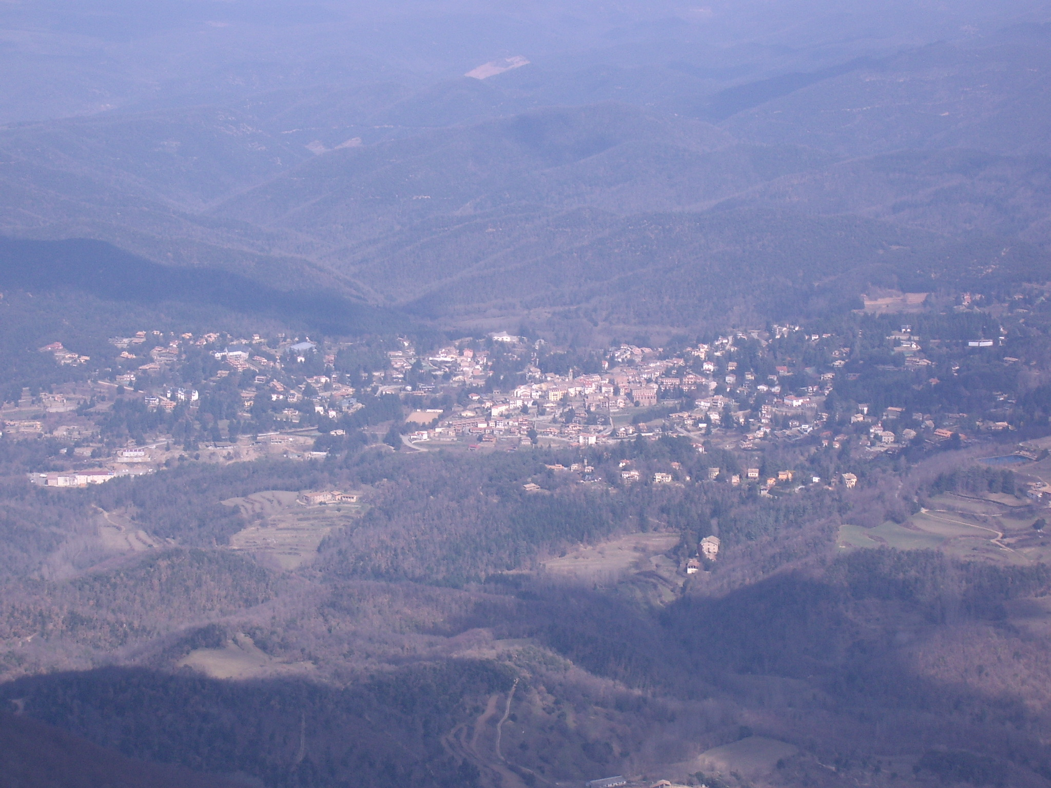 Viladrau, des del Matagalls